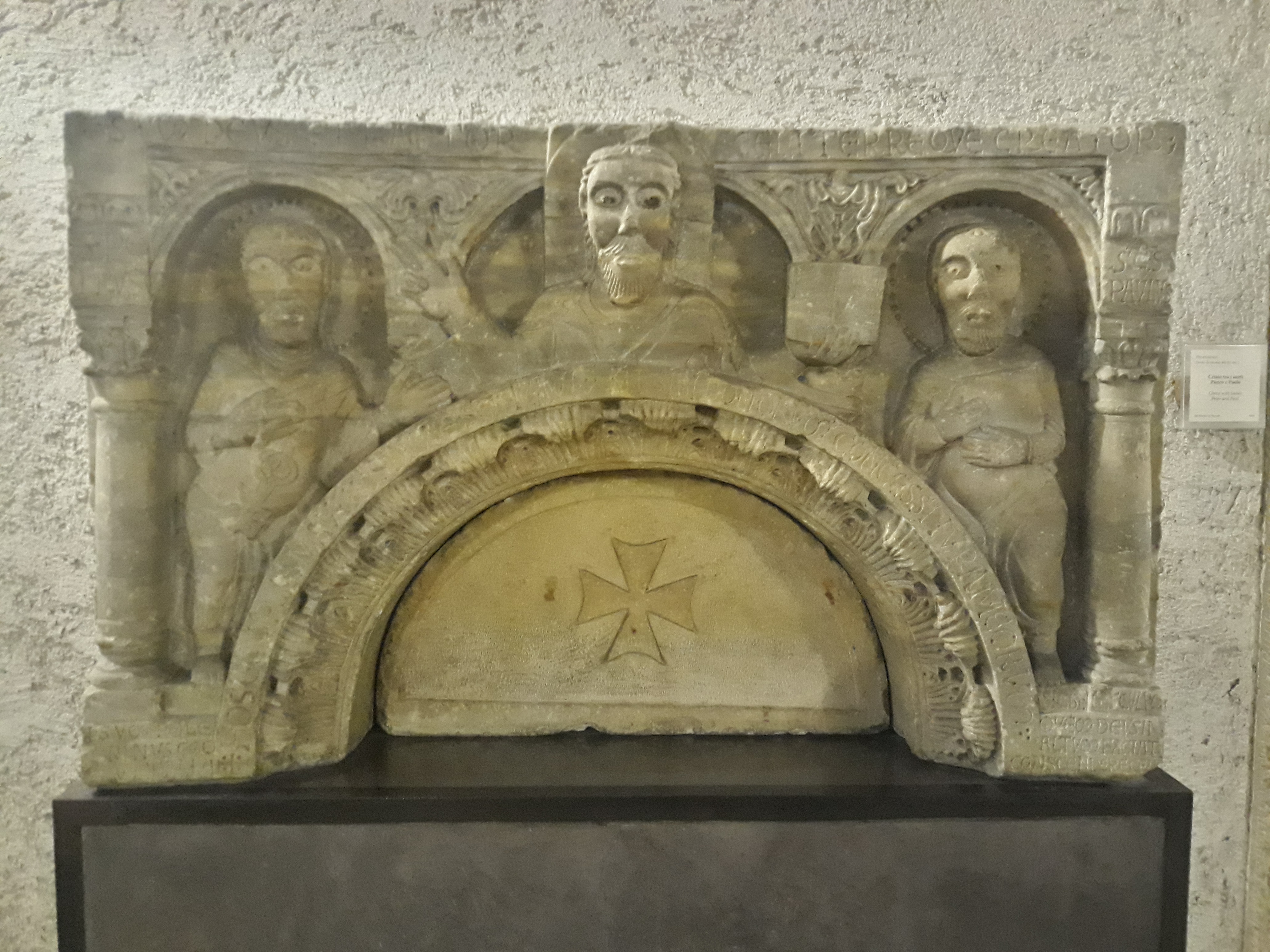 Peregrinus - terzo decennio XII. Cristo tra i Santi Pietro e Paolo